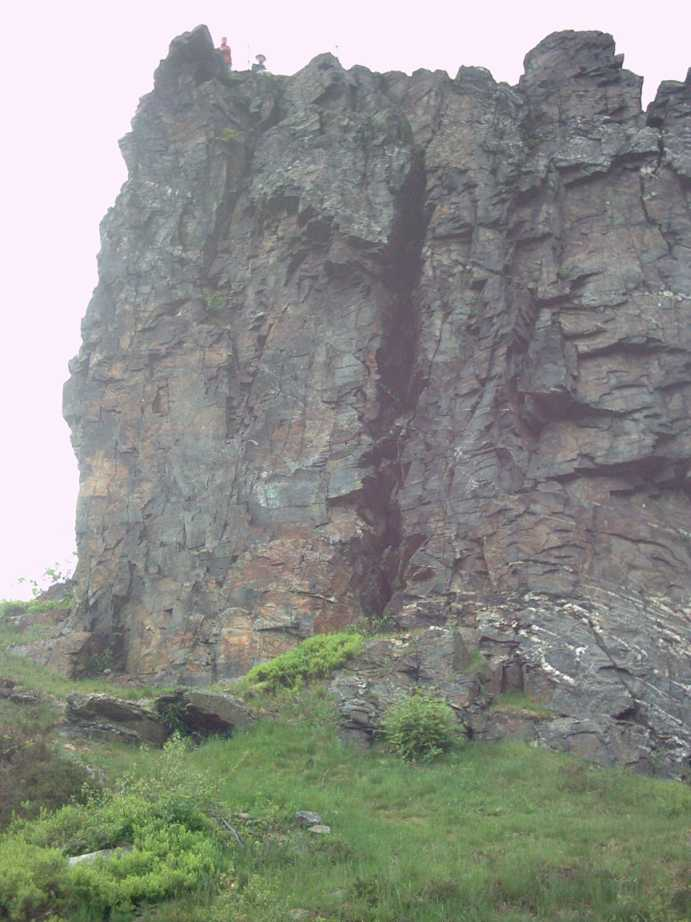 größte Steilwand am Hohen Stein, oben Aussichtsplattform